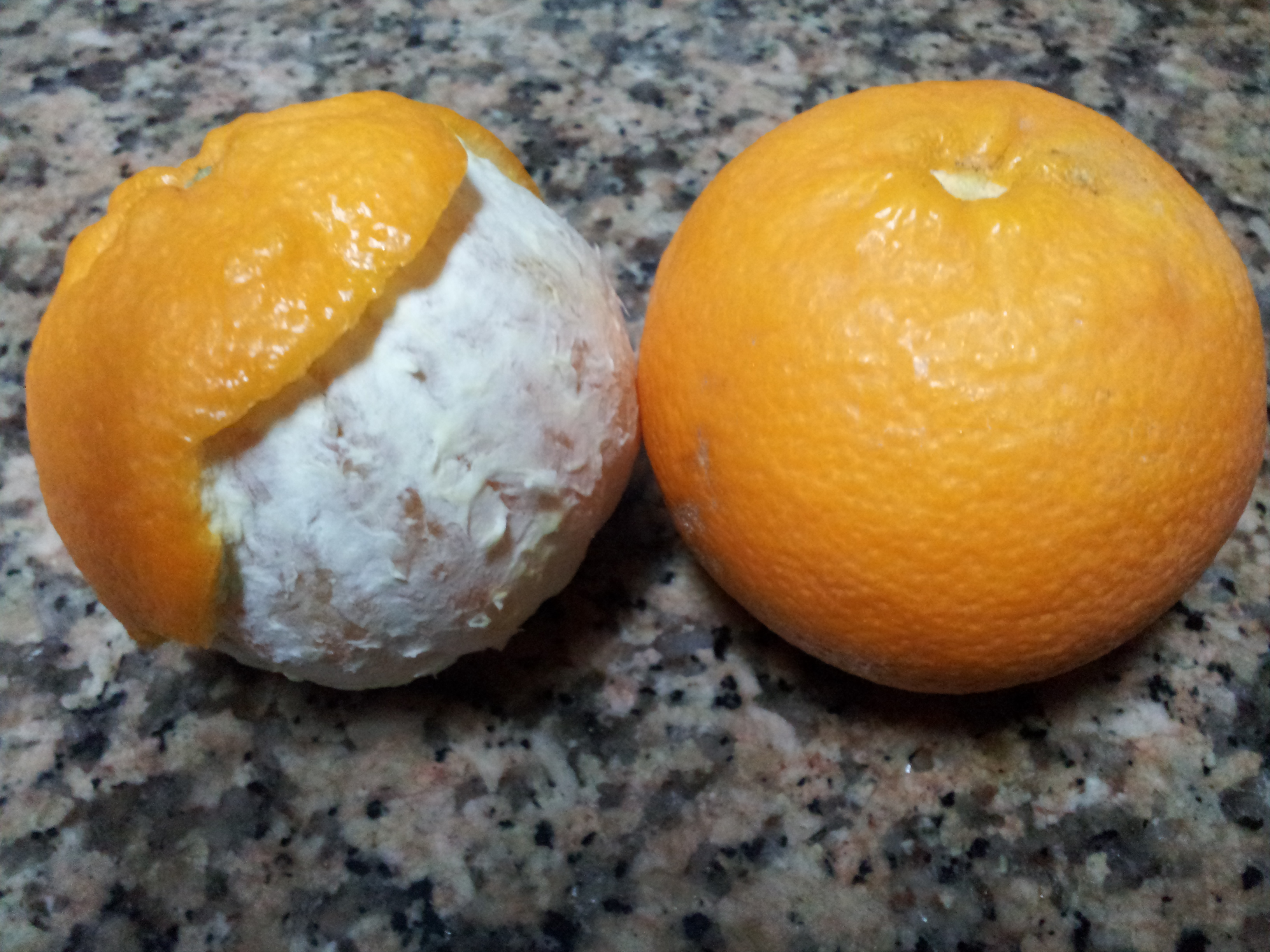 Salustiana pelada i per pelar.